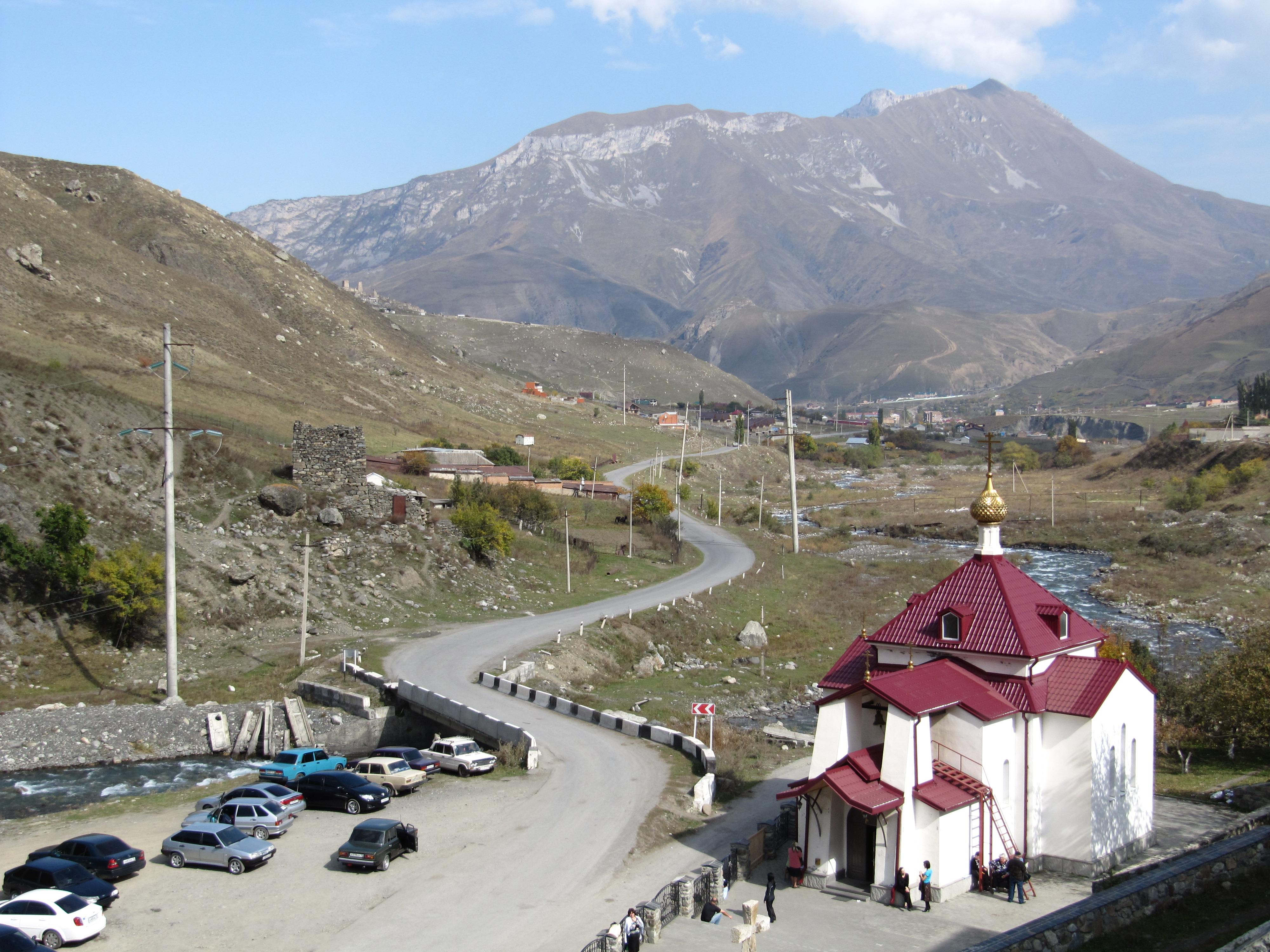 Ortodoksa kristana preĝejo ĉe la vira monakejo en Kurtata valo, Nord-Osetio